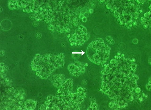 HIV-1感染細胞(MT-2細胞)の顕微鏡写真。